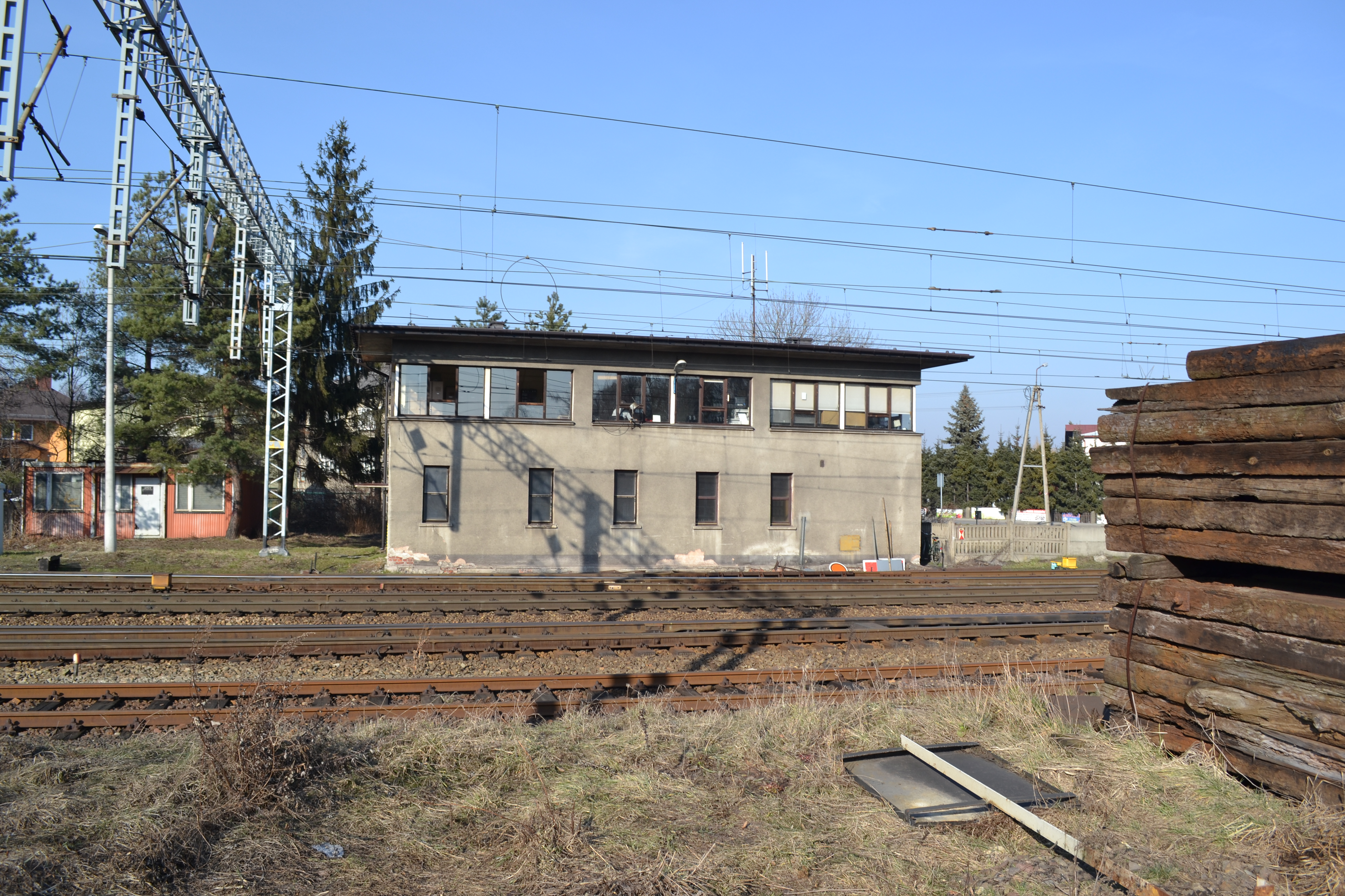 Nastawnia dysponująca CHY.